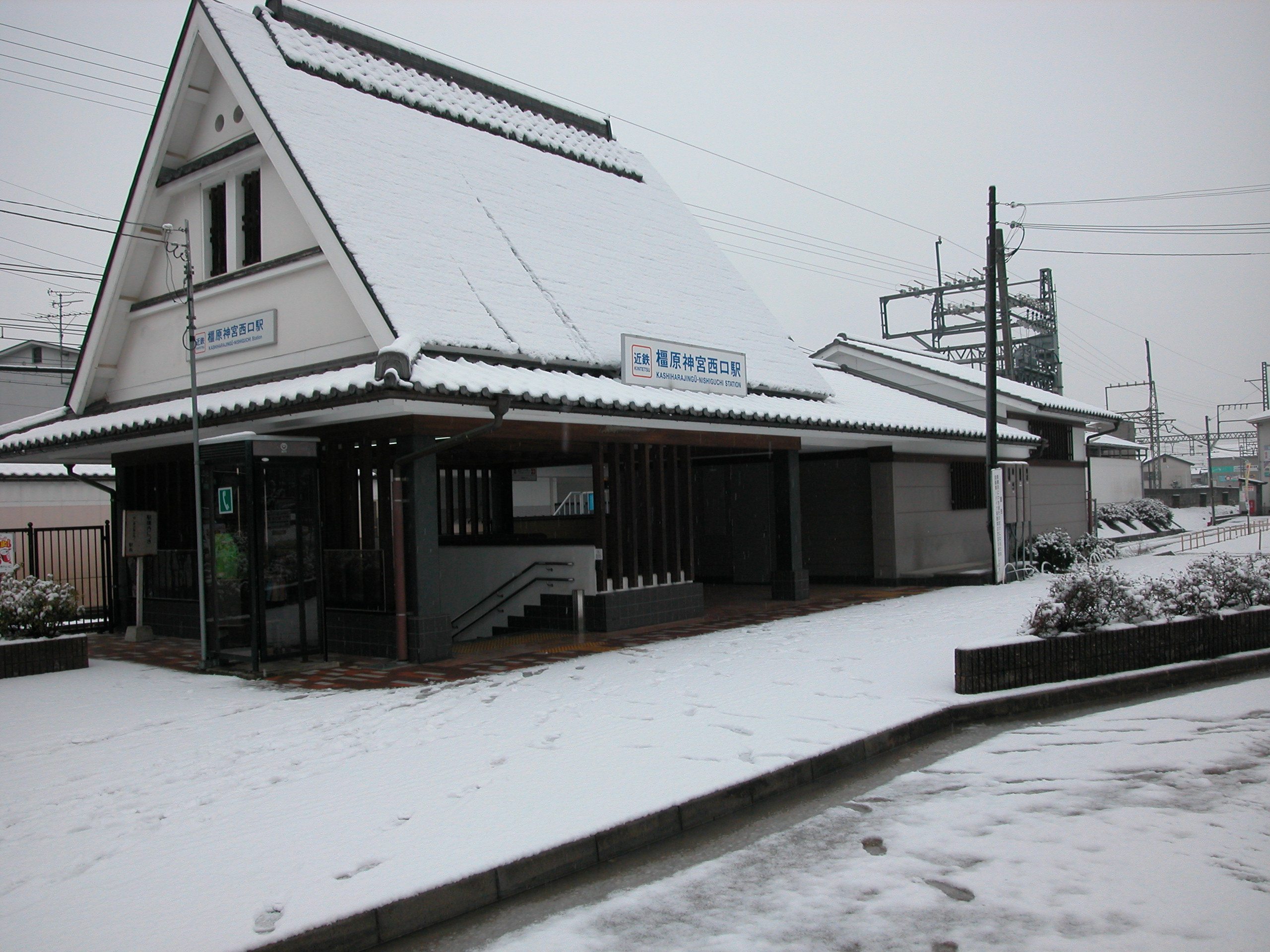 橿原神宮西口駅 北出口